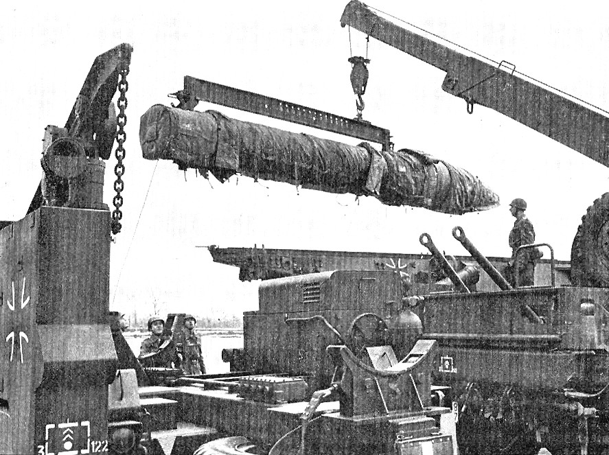 Honest John Ladeausbildung